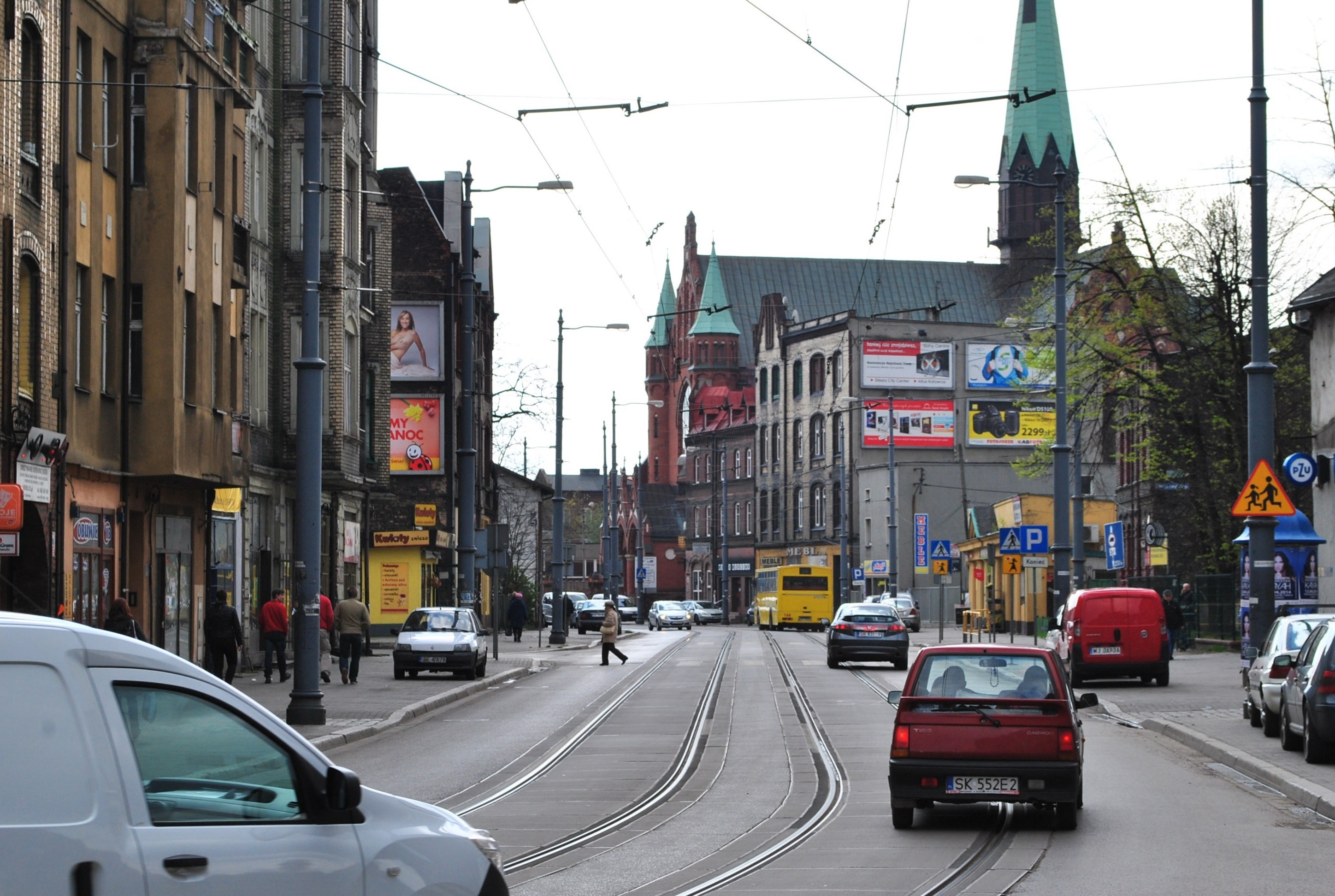 Ulica Gliwicka w Katowicach-Załężu. Widok w kierunku wschodnim